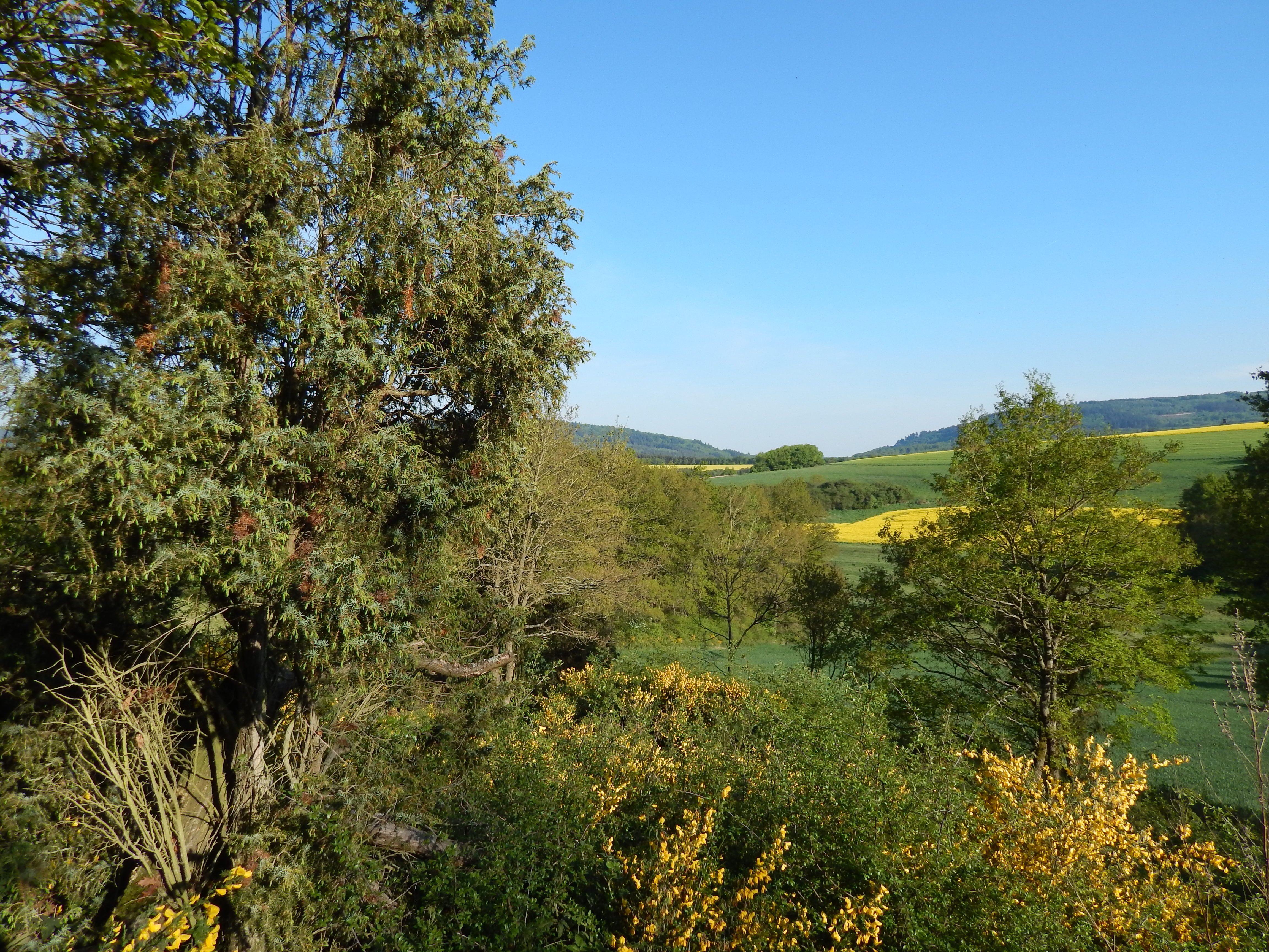 Naturschutzgebiet Nr. 7140-051 Das Naturschutzgebiet Wacholderheide bei Rohrbach zur Zeit der Ginsterblüte.